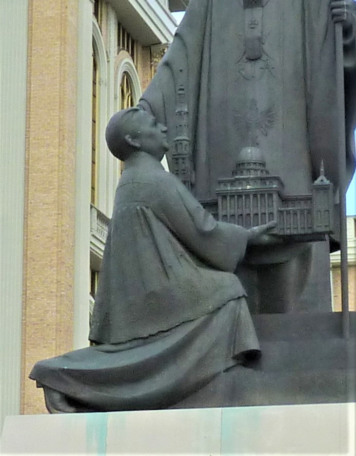 Licheń- Sanktuarium Matki Bożej Licheńskiej. Bazylika widok pomnika